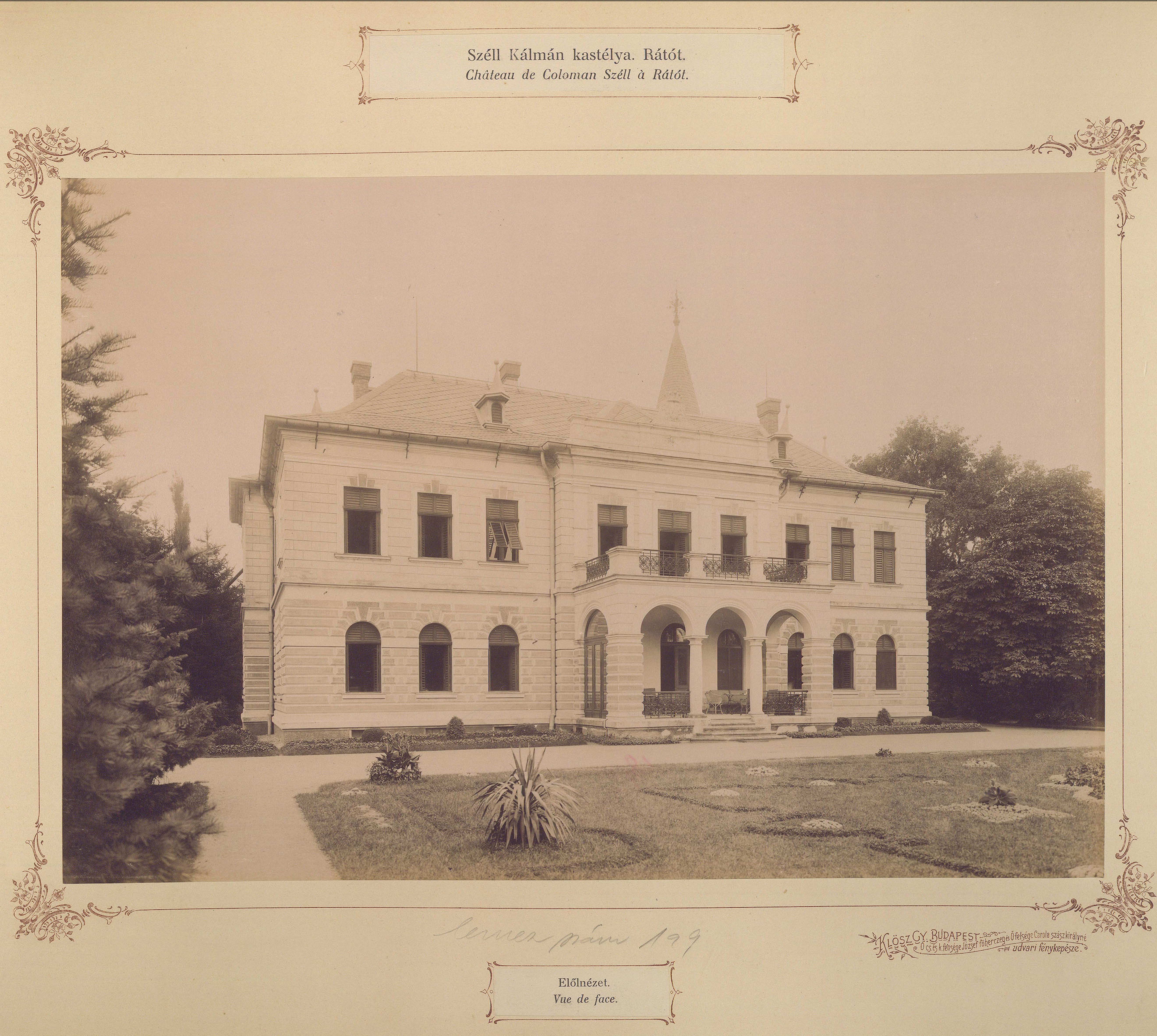 a Széll-kastély elölnézete. A felvétel 1895-1899 között készült. A kép forrását kérjük így adja meg: Fortepan / Budapest Főváros Levéltára. Levéltári jelzet: HU.BFL.XV.19.d.1.13.017 Location: Hungary Tags: castle Title: a Széll-kastély elölnézete. A felvétel 1895-1899 között készült. A kép forrását kérjük így adja meg: Fortepan / Budapest Főváros Levéltára. Levéltári jelzet: HU.BFL.XV.19.d.1.13.017